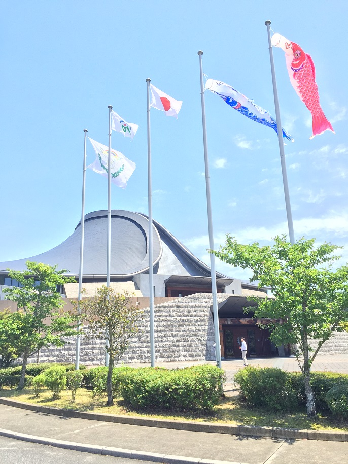 Budokan Miyamoto Musashi dans la province de Mimasaka arborant le drapeau de l’Esprit-Saint, du Japon, de Mimasaka et deux carpes au mois de mai 2015.